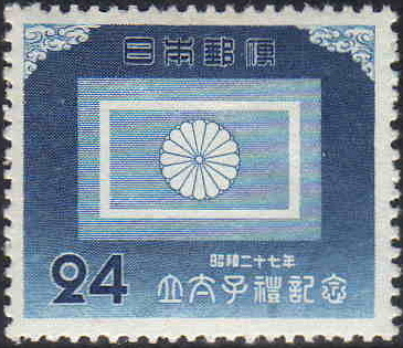 昭和27年に行われた今上天皇の立太子礼の記念切手のうち、皇太子旗を描く24円切手